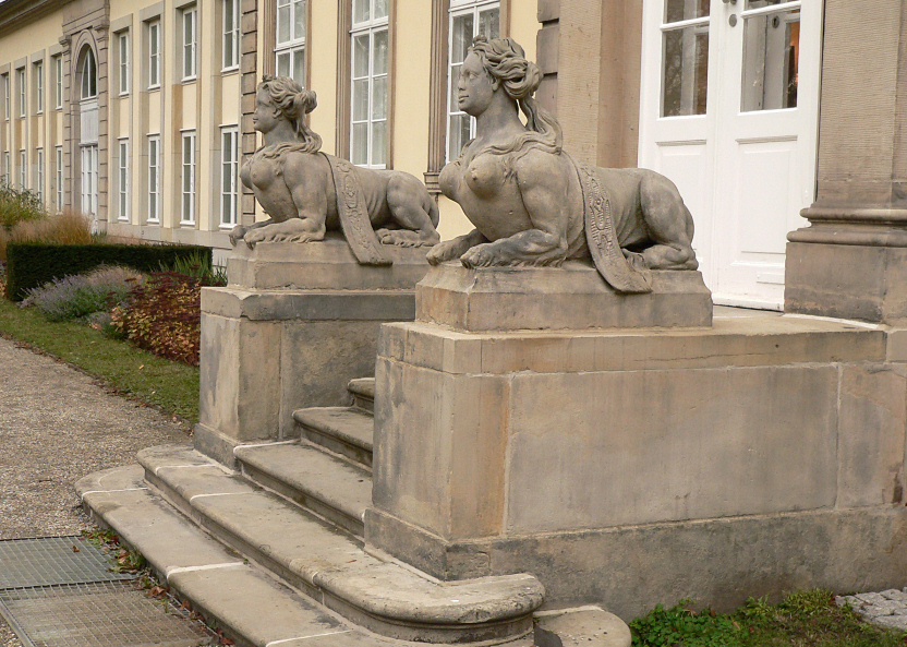 Spinghen Hannover Wilh. Busch Museum